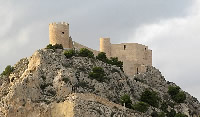 Castell de Castalla (Castalla, l'Alcoià, País Valencià)